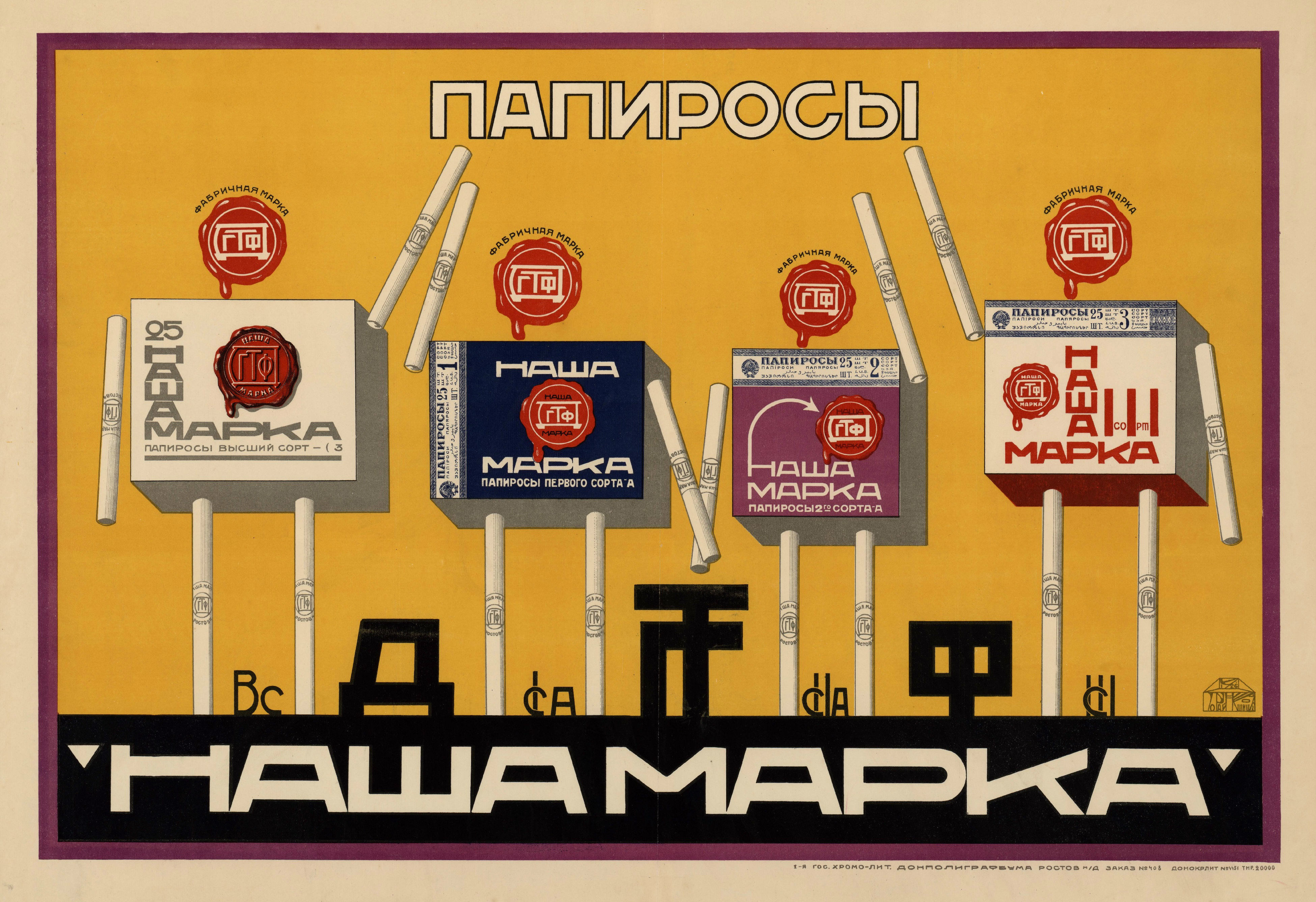 Плакат «Папиросы „Наша марка“. ДГТФ», рекламирующий продукцию Донского государственного табачного треста. Ростов-на-Дону : [б. и.], [1927] (1-я гос. хромолитография Донполиграфбума). Цветная литография, 1 лист, 27×54 см, 20 000 экз.